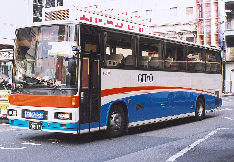 芸陽バス 日野 P-RU638BB 西工SD-I